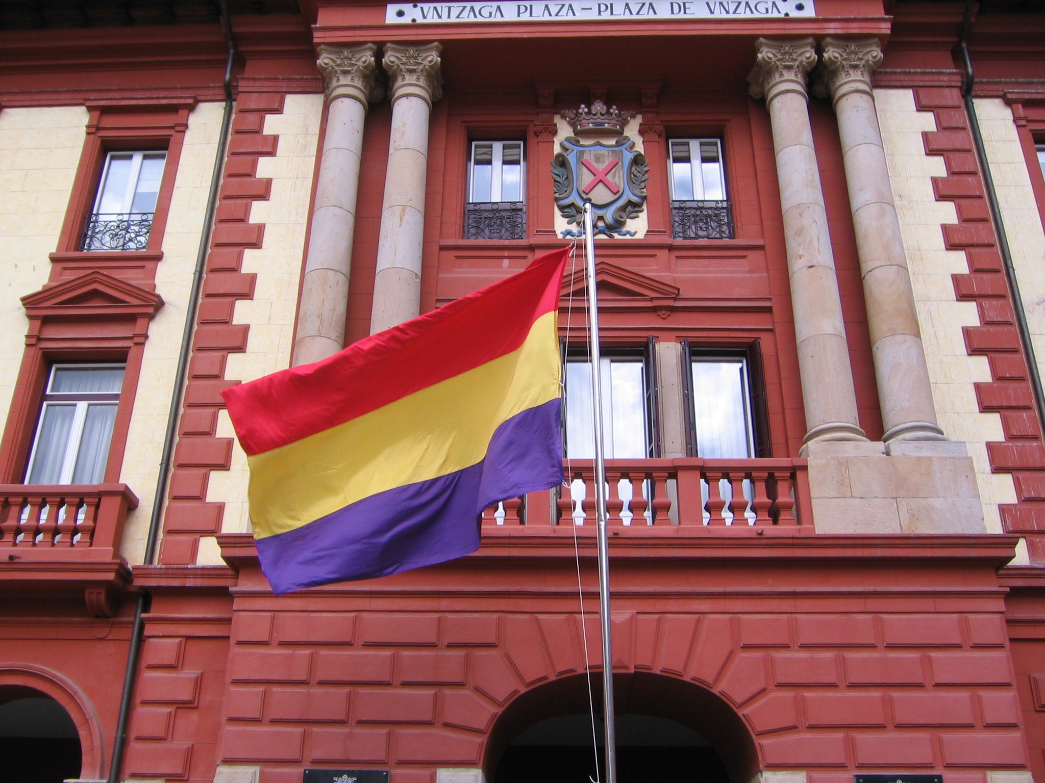 Izaiento de la bandera republicana en Eibar. Conmemoración del 77 aniversario de su proclamación.